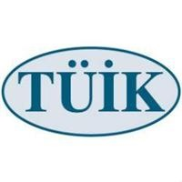 Türkiye İstatistik Kurumu